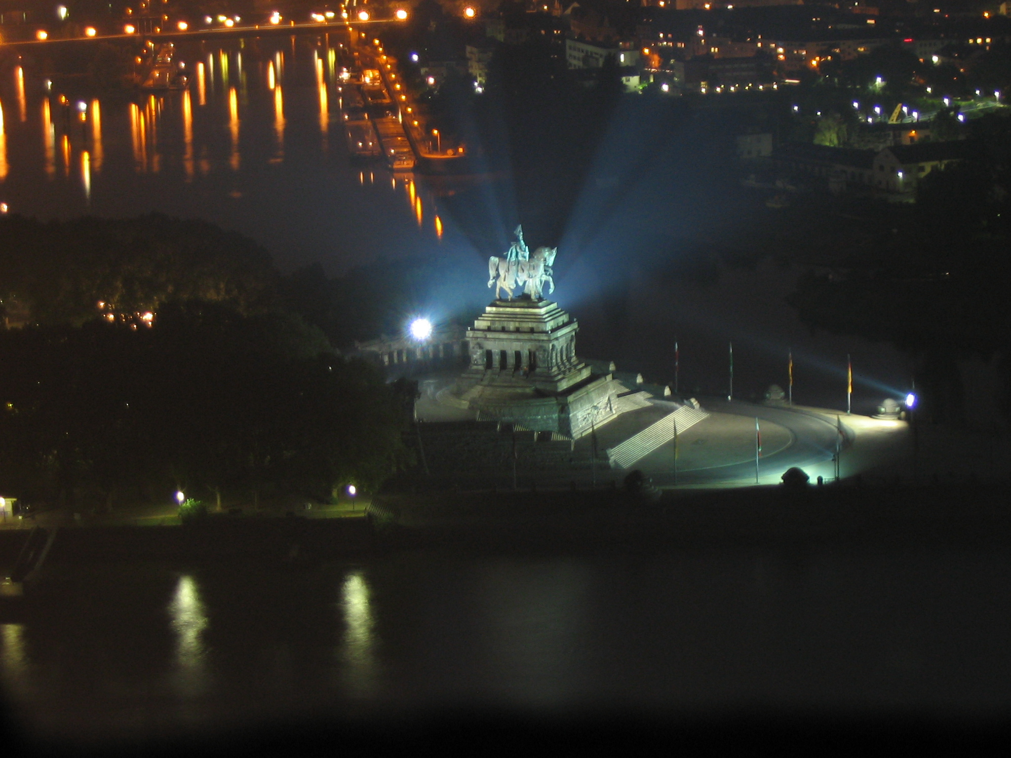 Deutsches Eck at night made from Festung Ehrenbreitstein